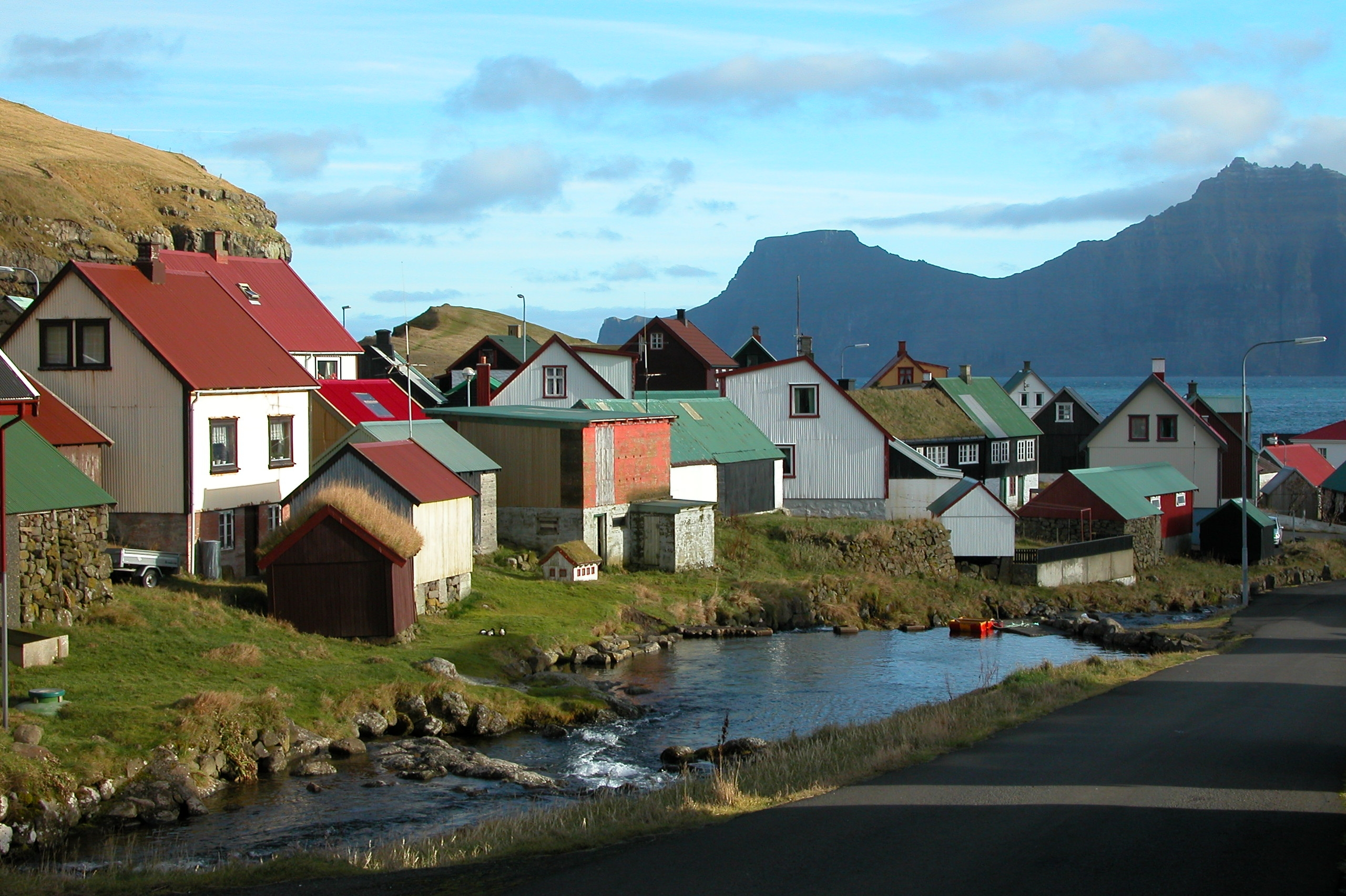 Gjógv in Eysturoy, Faroe Islands.